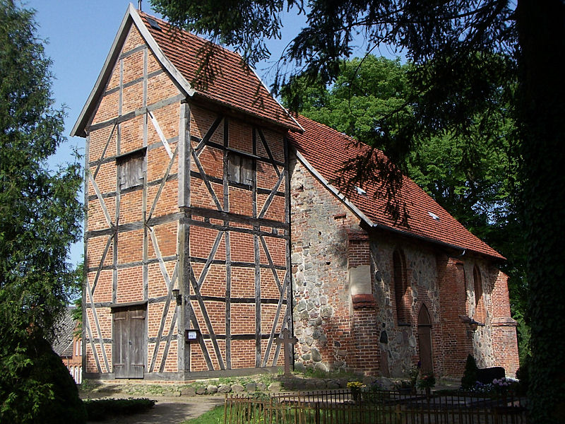 Kirche in Zapel, Landkreis Ludwigslust-Parchim Landesbibliothek MV: G. C. F. Lisch: Die Kirche zu Zapel (Landesbibliothek MV: Jahrbücher des Vereins für Mecklenburgische Geschichte und Altertumskunde, Band 27 (1862), S. 219)